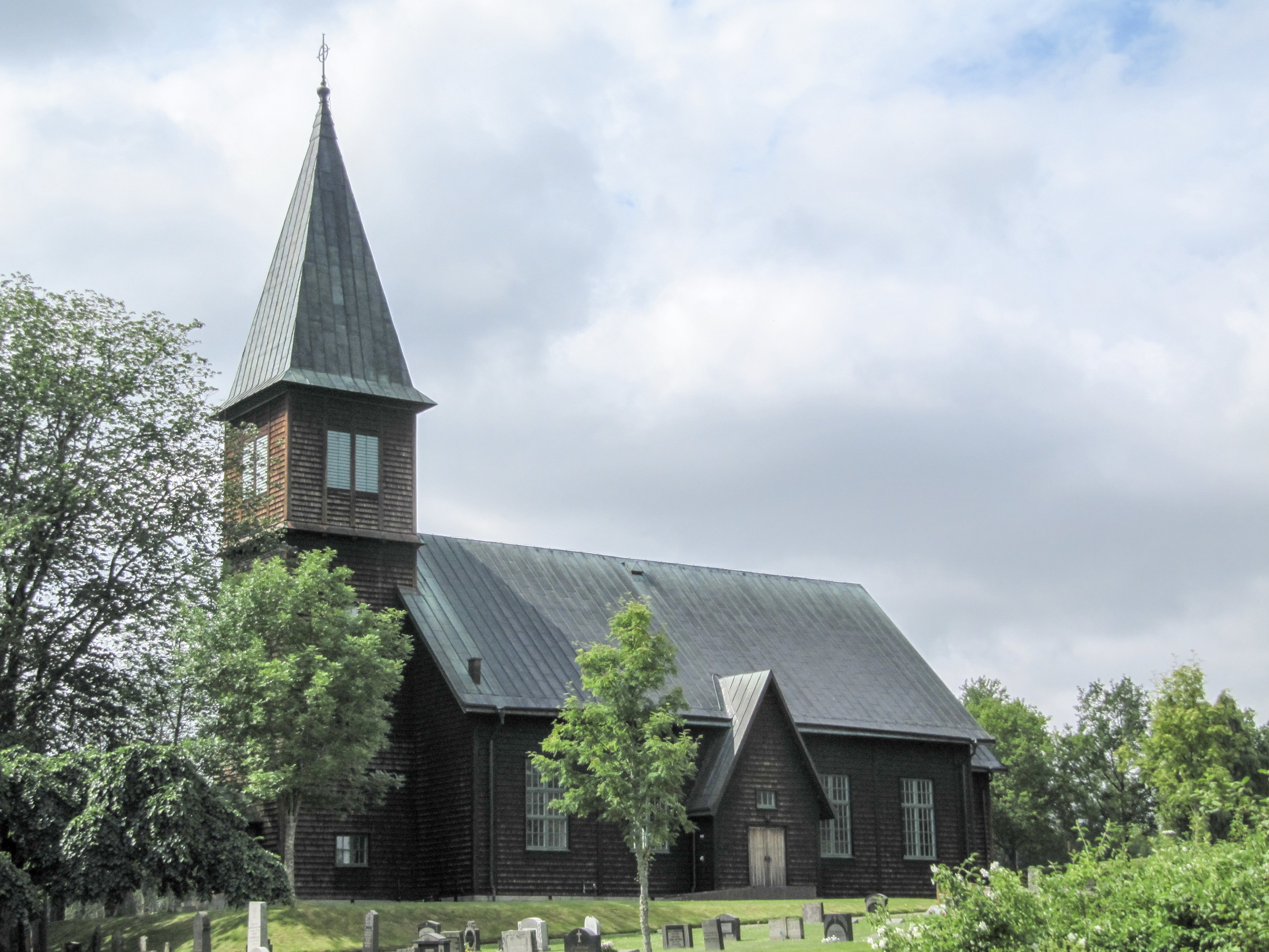 Aneboda kyrka